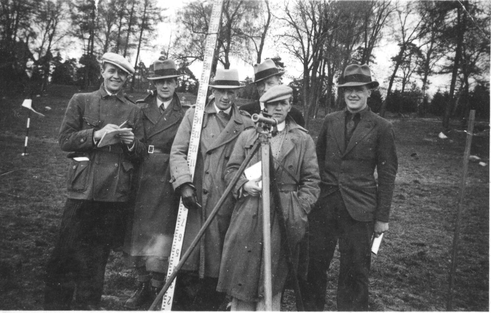 Vägmästarkurs vid STI 1935, examensklass på Järvafältet